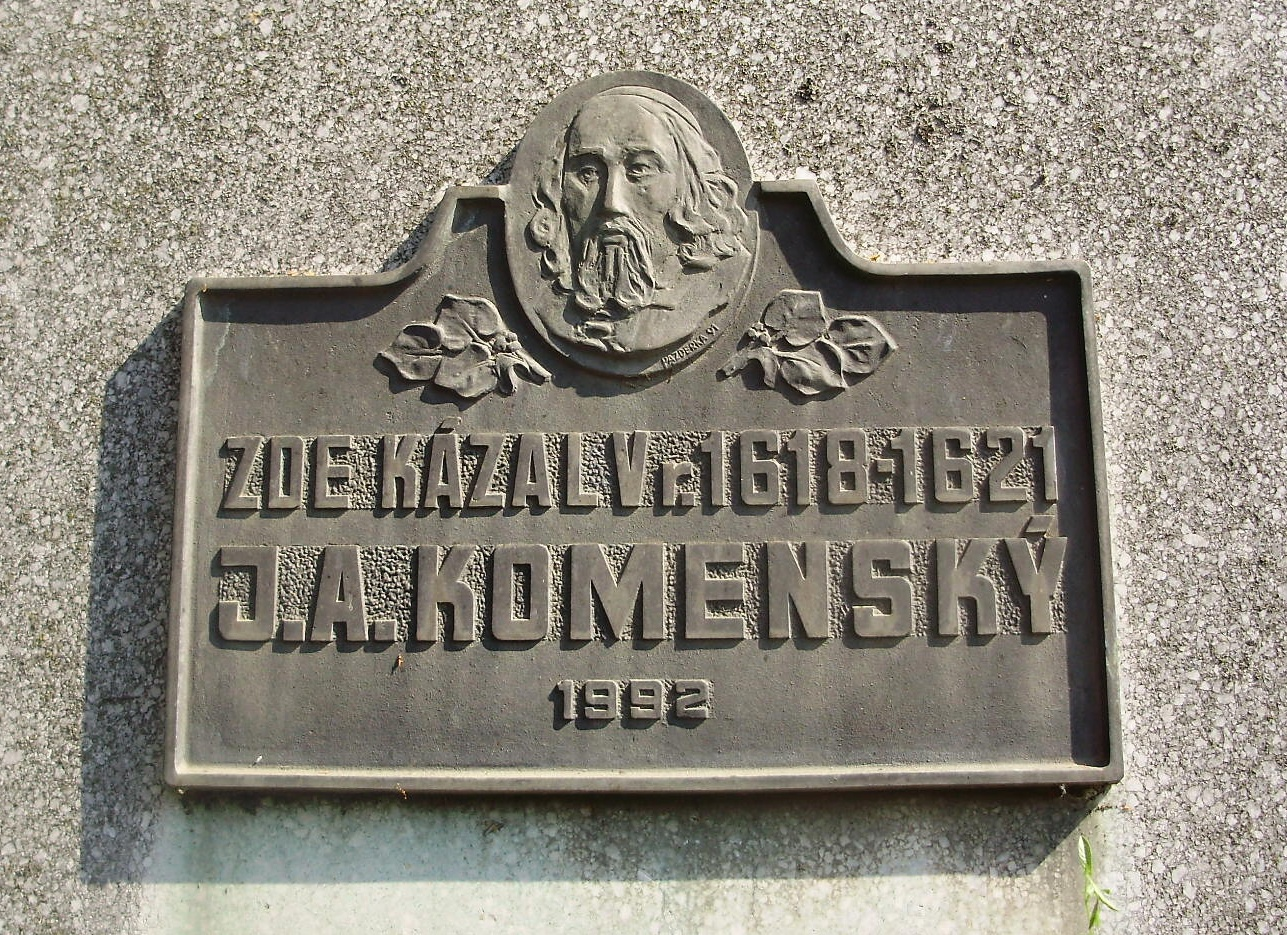 Pamětní deska J.A.Komenský - Suchdol nad Odrou